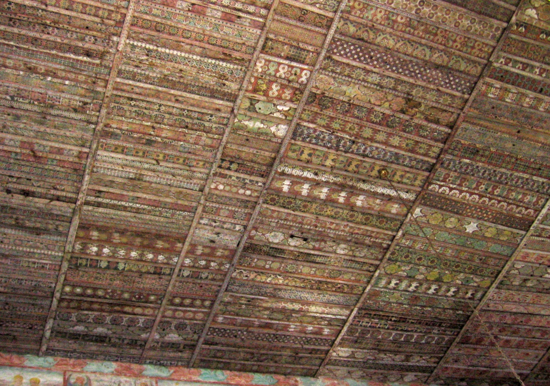 kościół w Małujowicach na Dolnym Śląsku - drewniany malowany strop z 640 desek